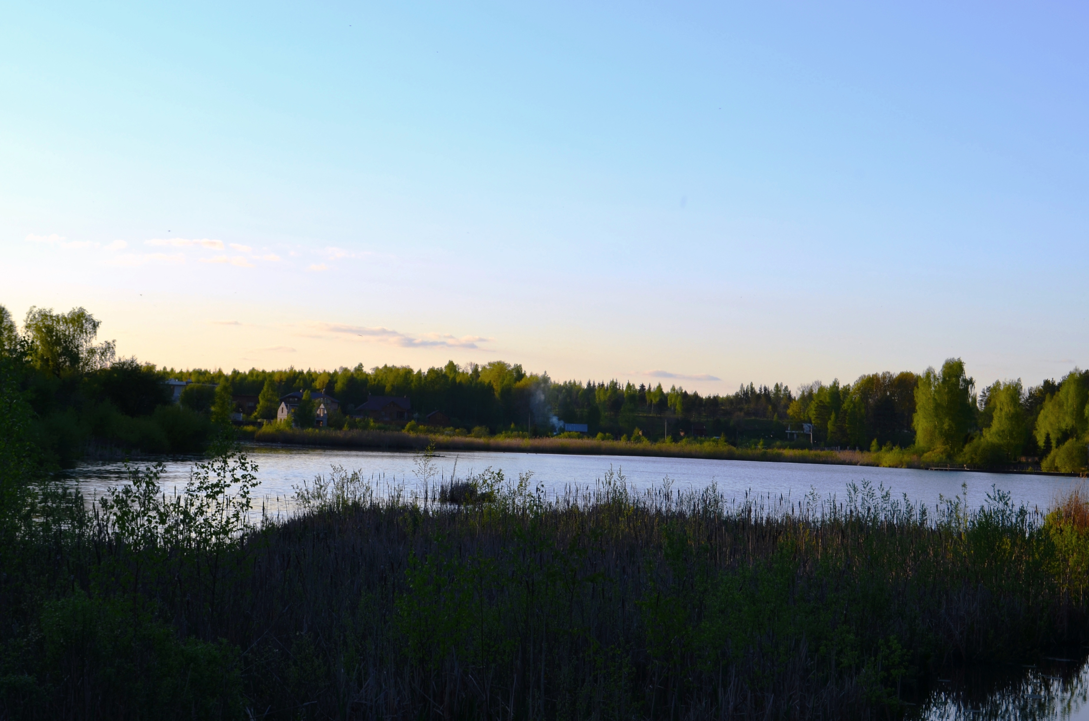 Ežeras Gilužis, Tarandė, Vilnius